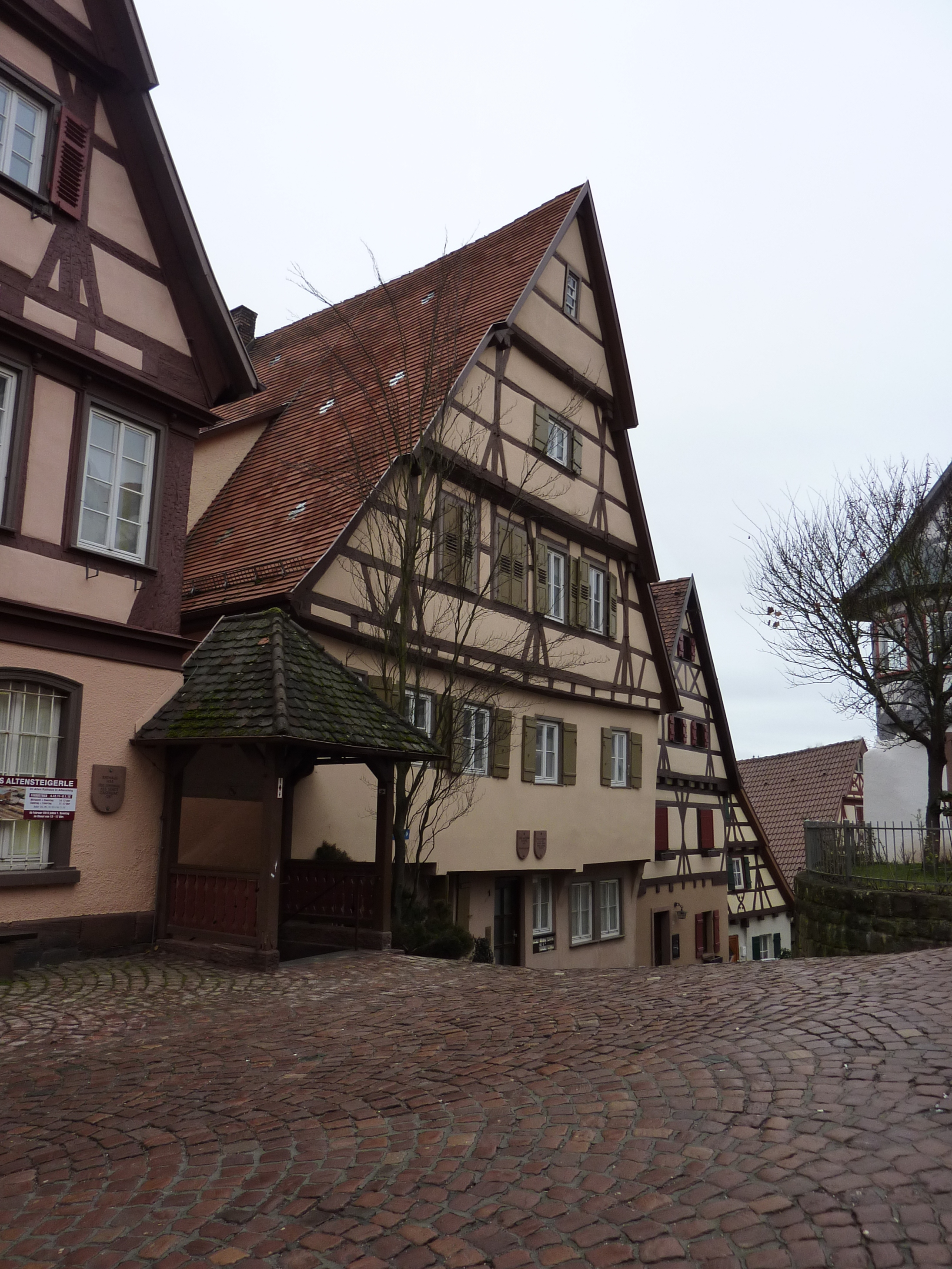 Gasthaus Blume, Altensteig